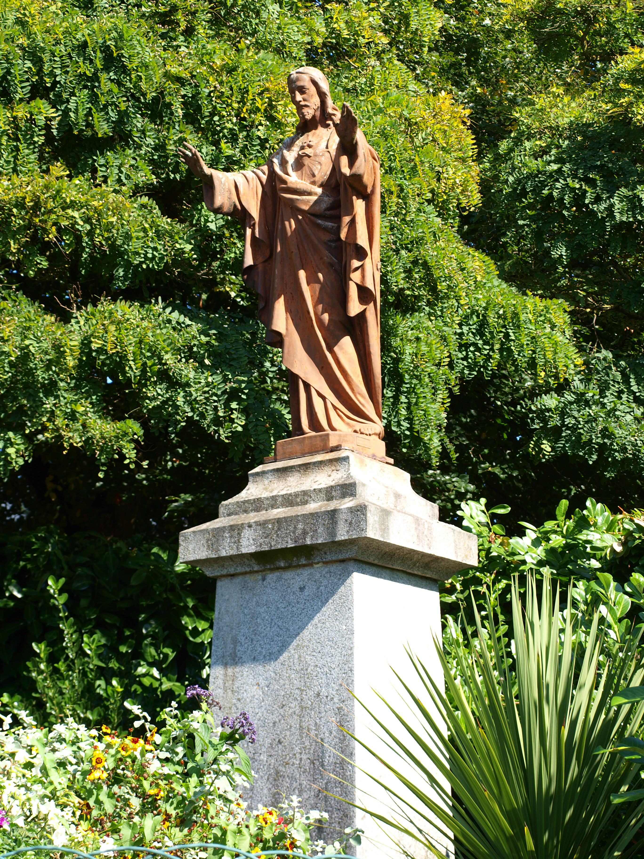 Saint-Didier (Ille-et-Vilaine, France) ; bondieuserie